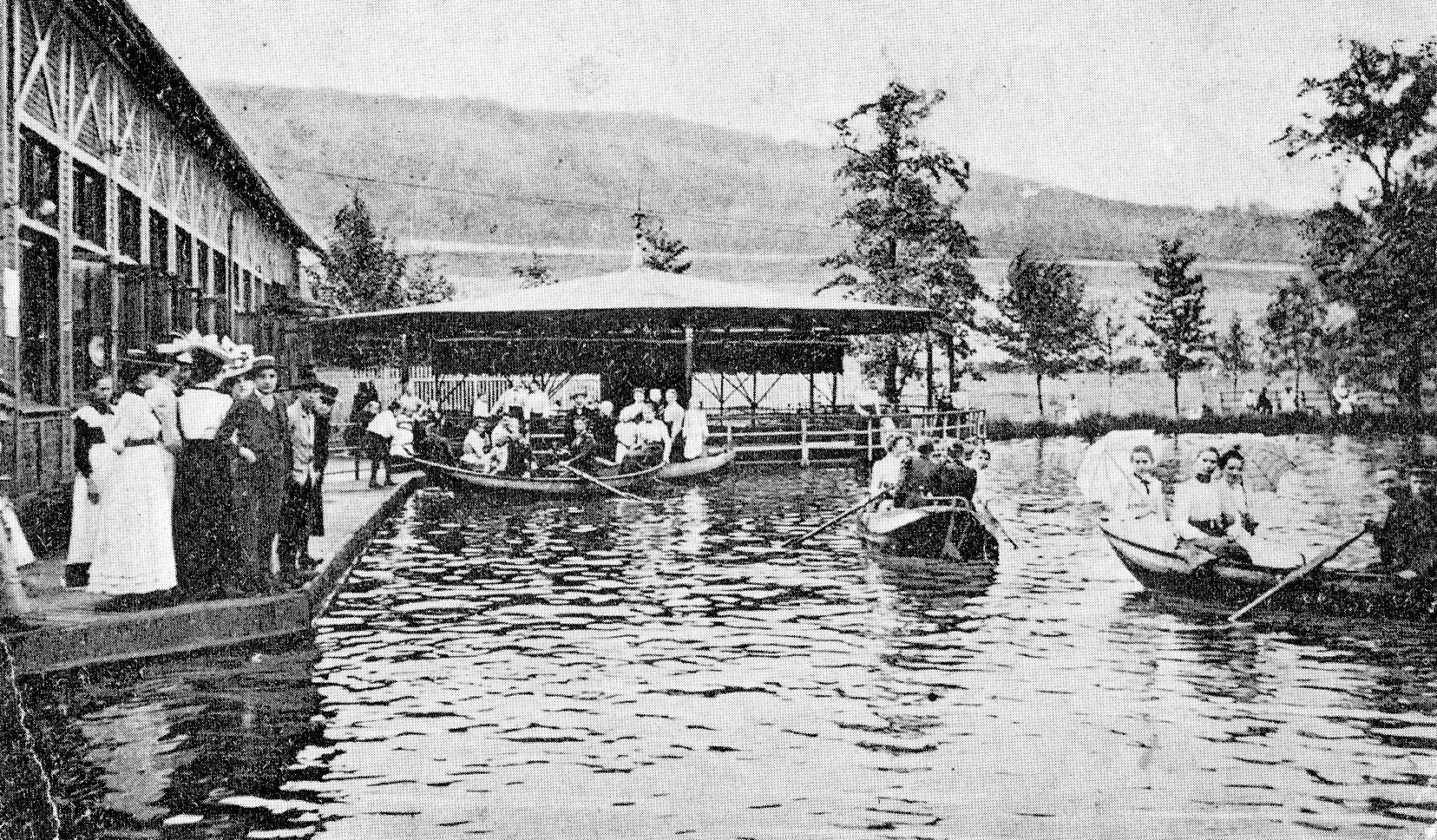 Gondelteich des Ausflugslokals Schnupftabaksmühle in Schwelm, NRW, Deutschland